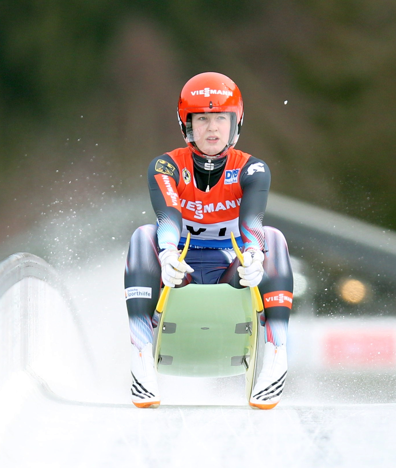 Jessica Tiebel beim Rennrodel-Weltcup der Damen in Altenberg 2017